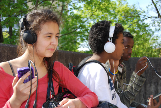 Foto: Rebecca Medici Antigone i Husby, ett interaktivt drama för mobiltelefonen.